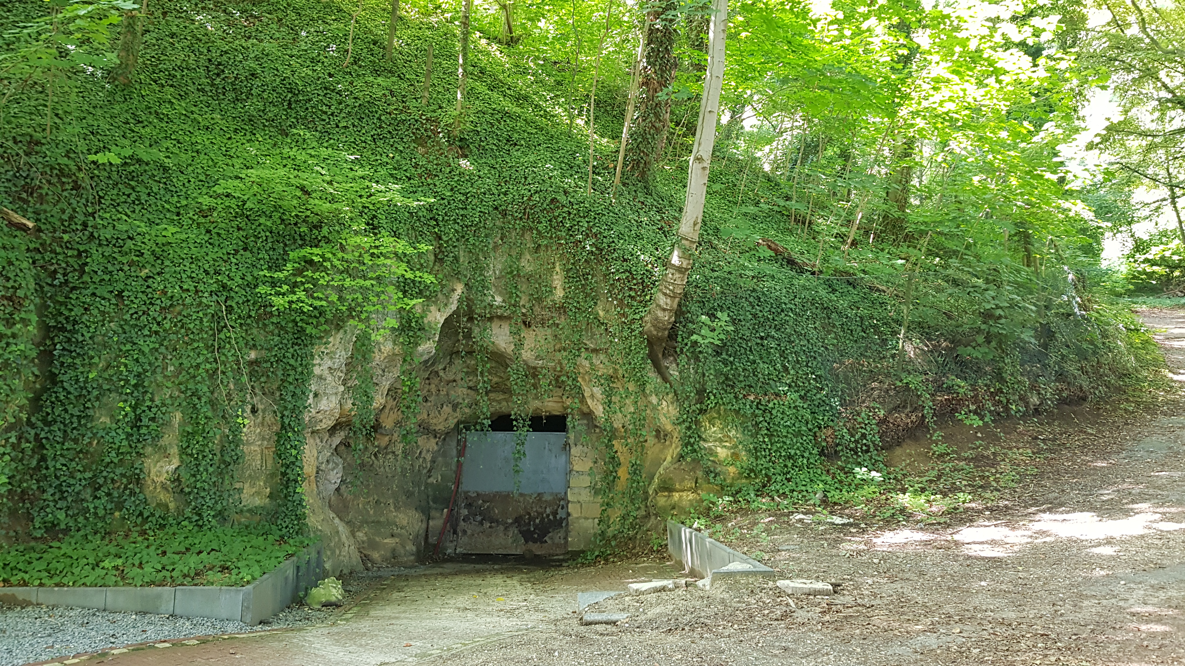 Hoorensberggroeve, Valkenburg, Nederland